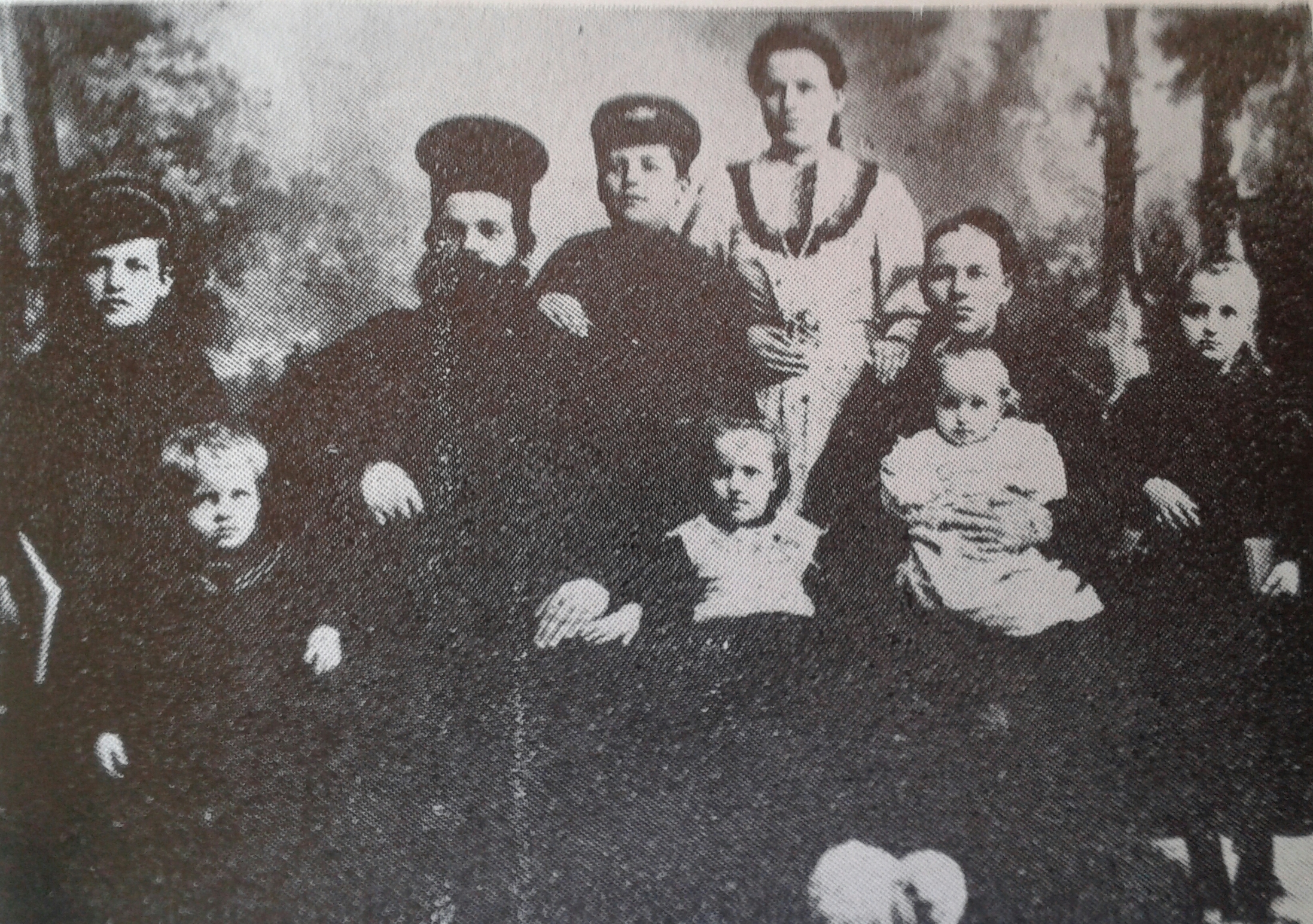 Отец Никола със семейството си. Децата от ляво надясно са: Александър, Борис, Траян, Стоянка, Олга и Лозана. 1910 г.